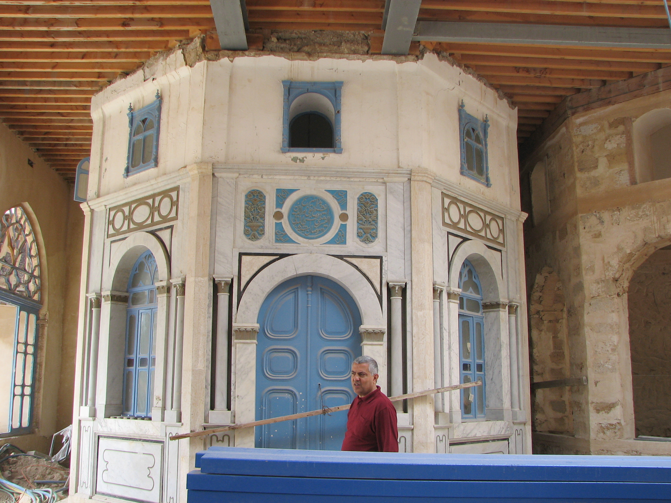 Akko, El Shazliya Mosque under construction. The cost of construction is estimate 80 M $ מסגד אל -שאזליה בעכו. מרכז השאזלים נמצא בלבנון. במשך שנים מרכז זה נזנח והשוכרים הרחיבו את בתיהם. השאזלים החליטו לשפץ אץ המקום הם פינו את הדיירים תוך מתן פיצויים והחלו בשיפוץ האתר הכולל מסגד מבנים וקברים. ההשקעה המוערכת במבנה באתר היא 80 מליון דולר This image was taken as part of the Elef Millim project trip to the Old City of Acco, which was held on Friday, 5th March 2010. To view all images uploaded as pary of the Elef Millim Project כתובות מעל אזור הקבורה